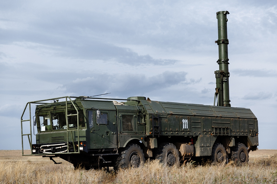 Подготовка расчётов оперативно-тактического ракетного комплекса «Искандер» 92-й ракетной бригады к применению в рамках СКШУ «Центр-2015».